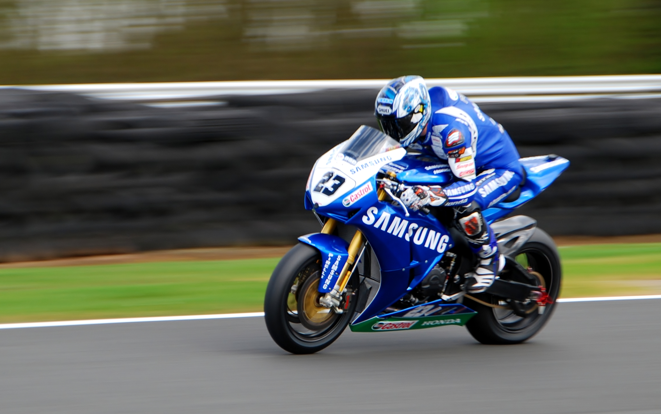 practice session